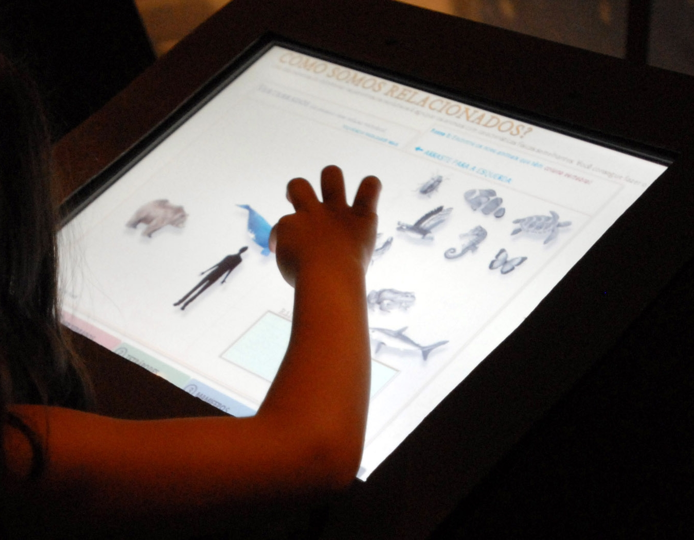 Exposição que marca os 200 anos do nascimento do naturalista Charles Darwin, na Esplanada dos Ministérios, em Brasília